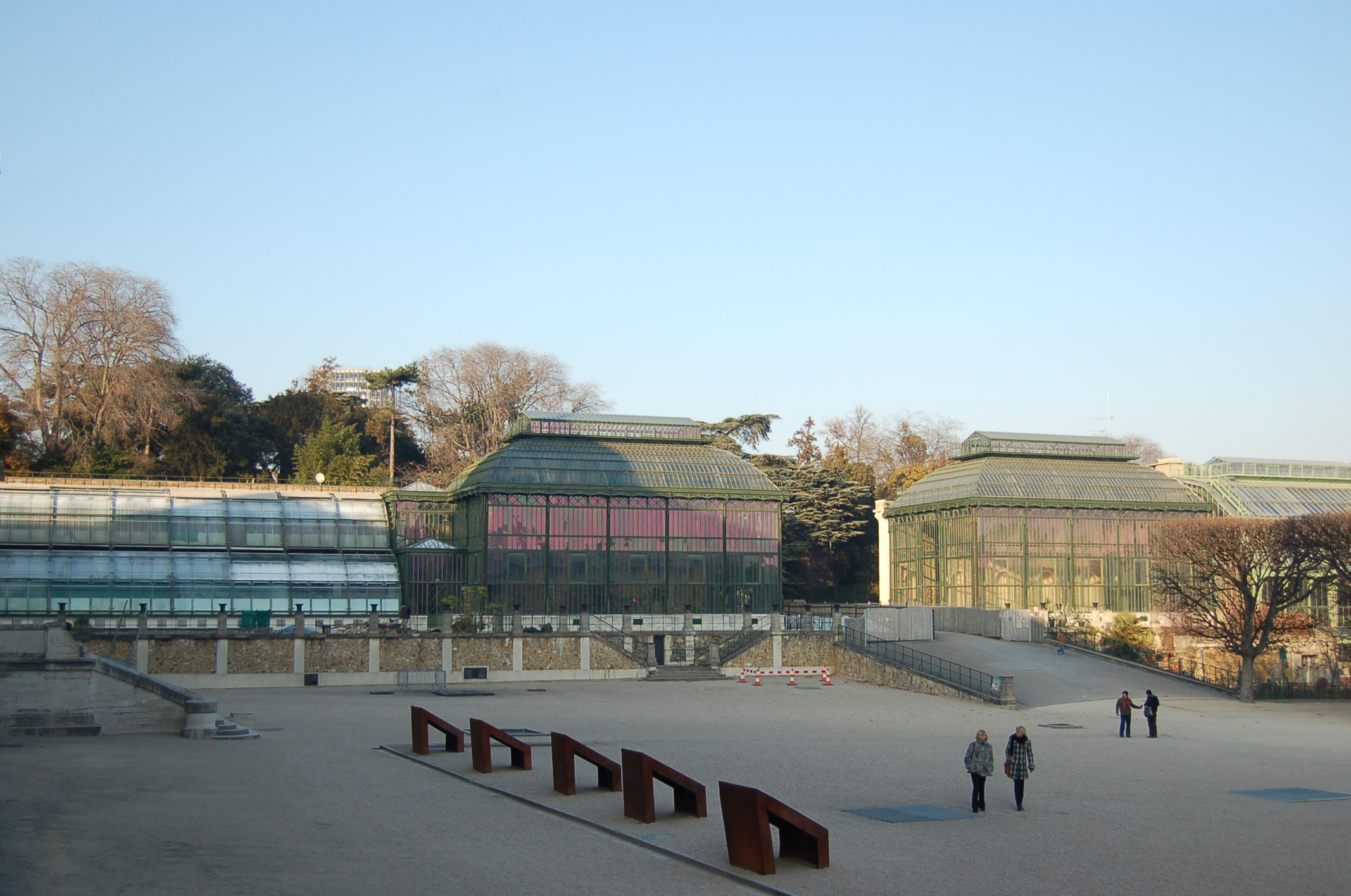 Serres du Jardin des Plantes de Paris